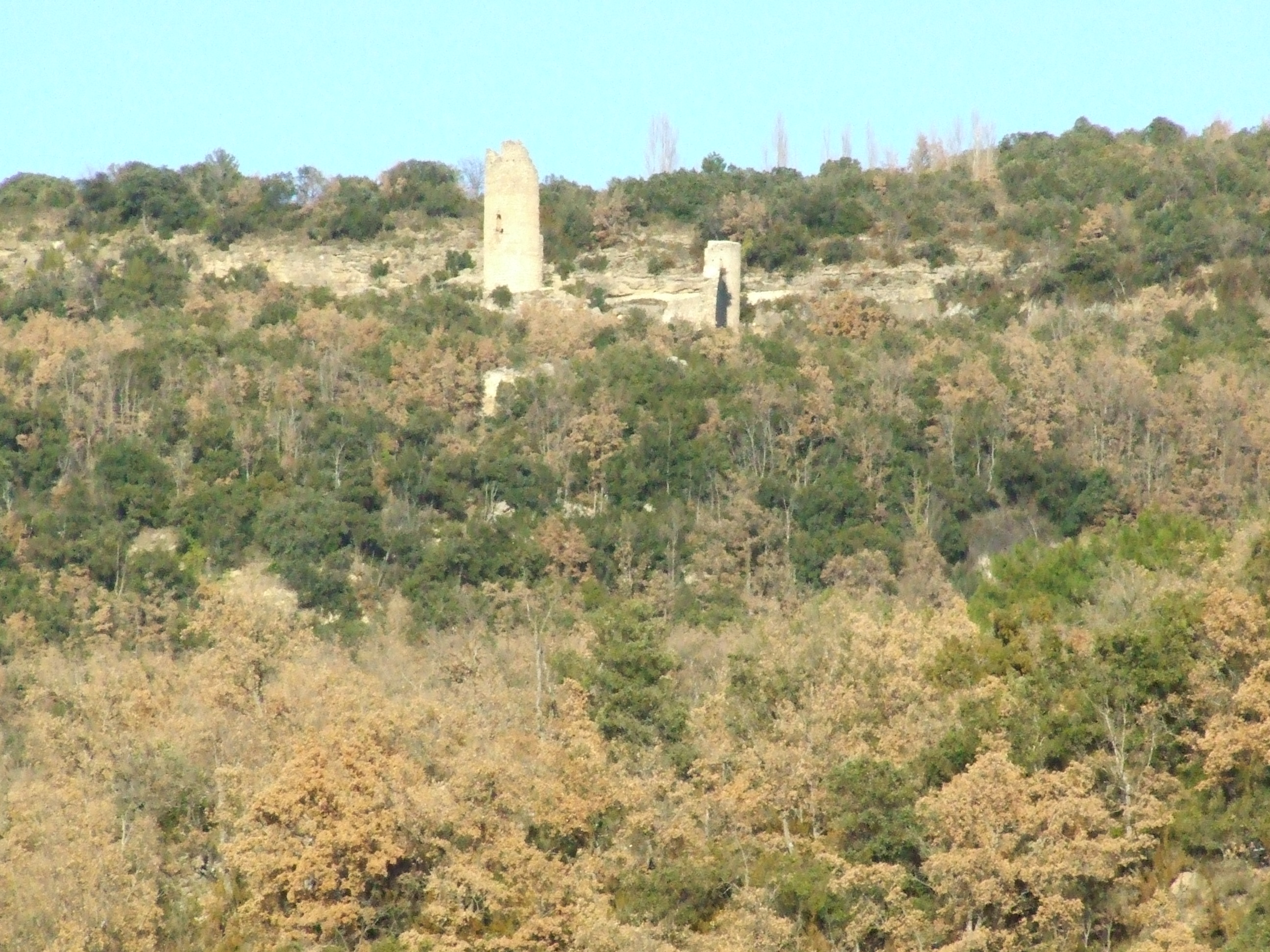 El Castell de Sant Miquel de la Vall des de la Vall de Barcedana (Aransís, Gavet de la Conca, Pallars Jussà)